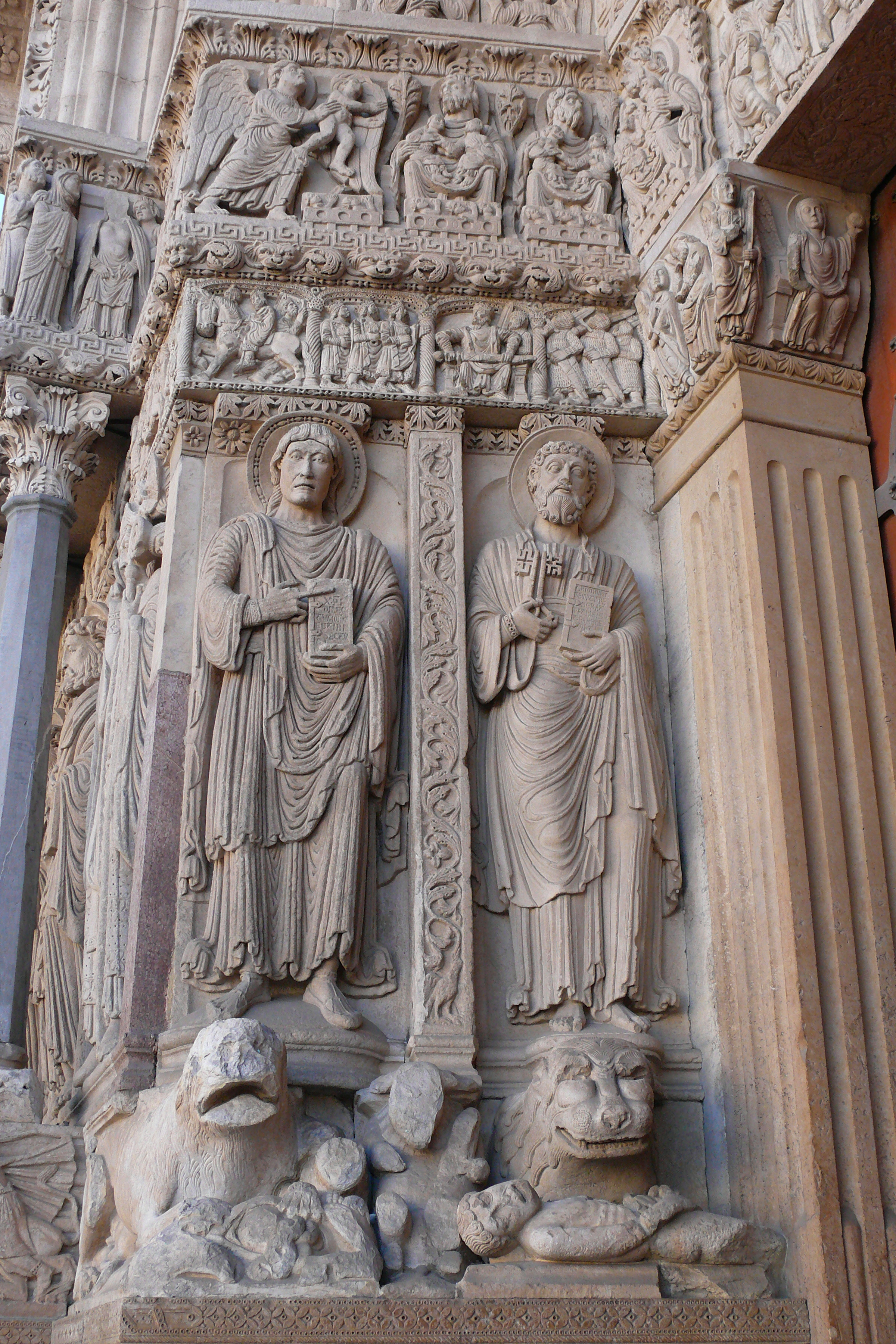 Detail des Portals von St.Trophime in Arles